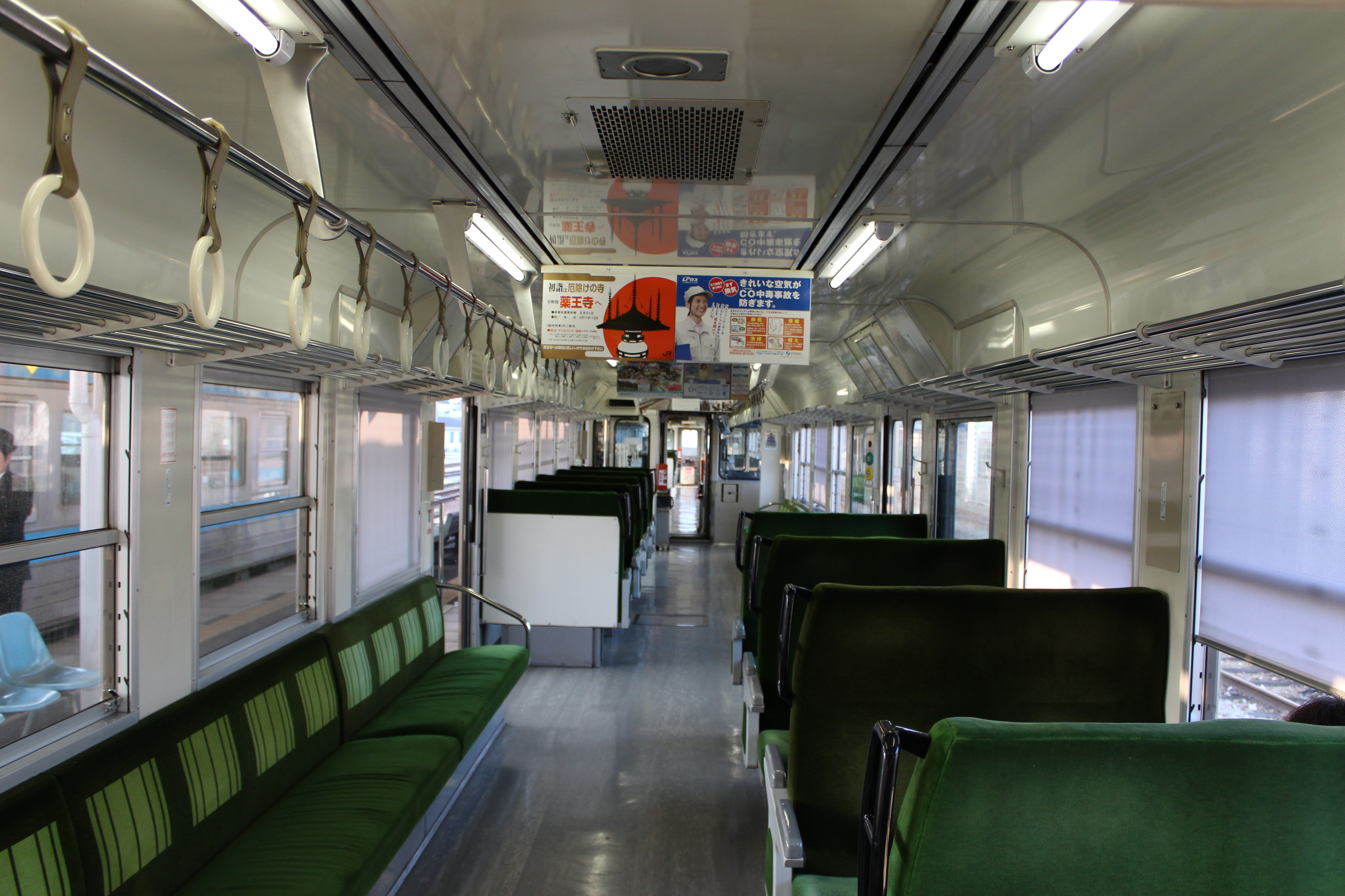 1000形の車内